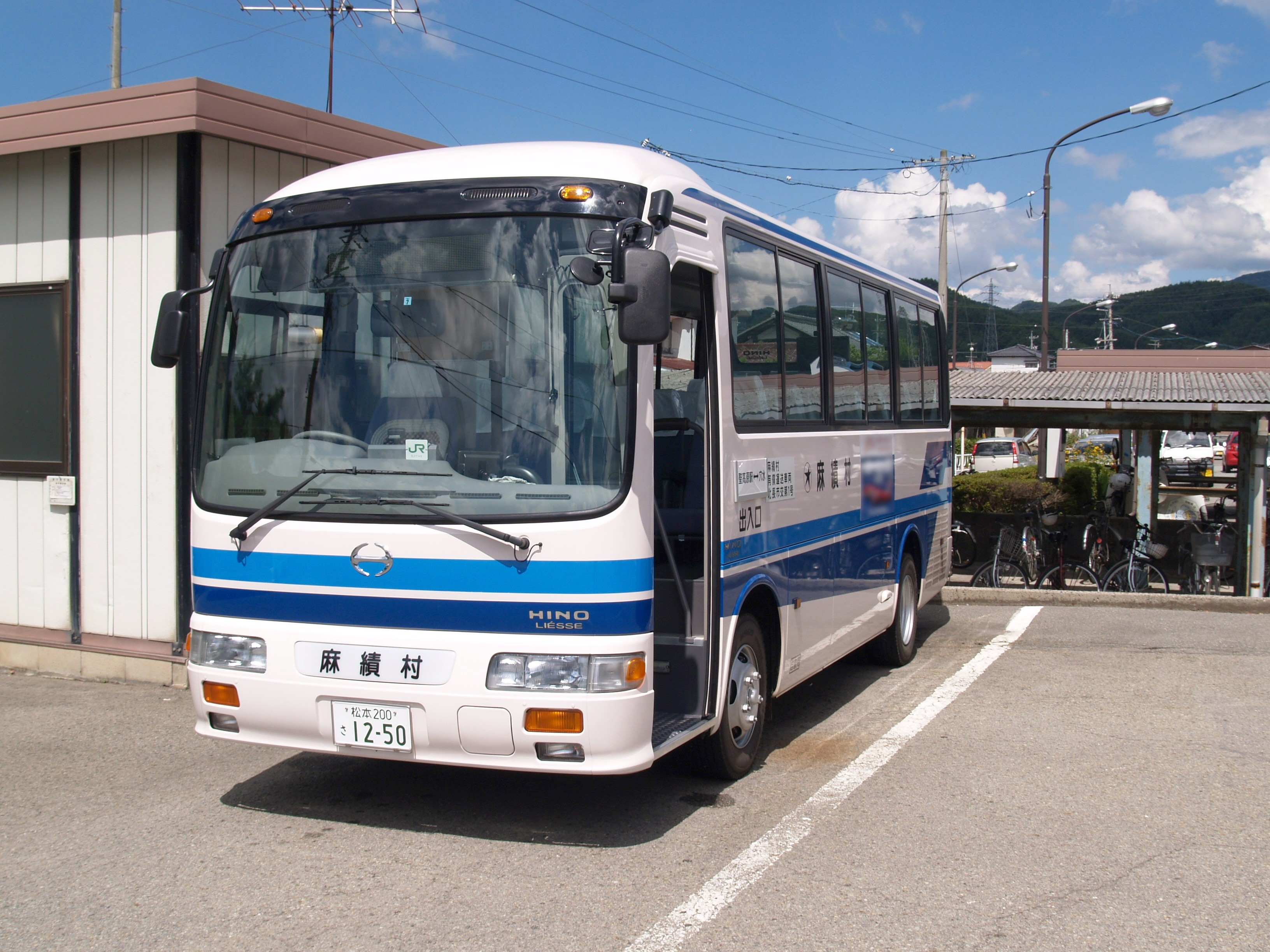 麻績村営バス（聖高原駅前にて撮影）